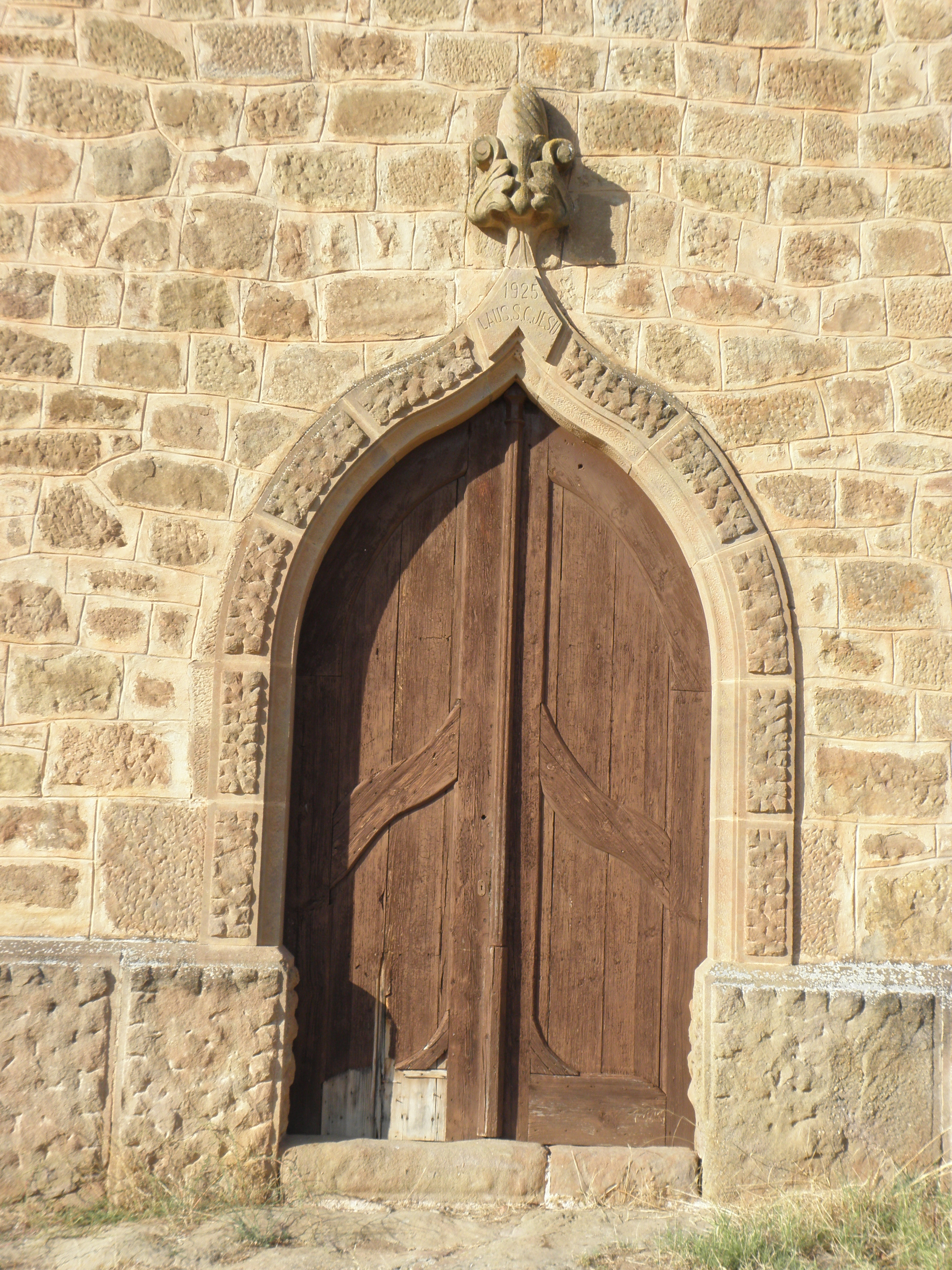 La porta d'entrada de l'església nova de Sant Jaume, al poble de Sallent (municipi de Sallent de Solsonès).